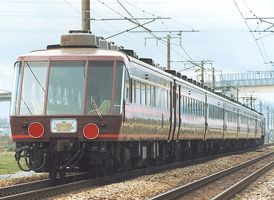 JR東日本 14系欧風客車 サロンエクスプレス東京